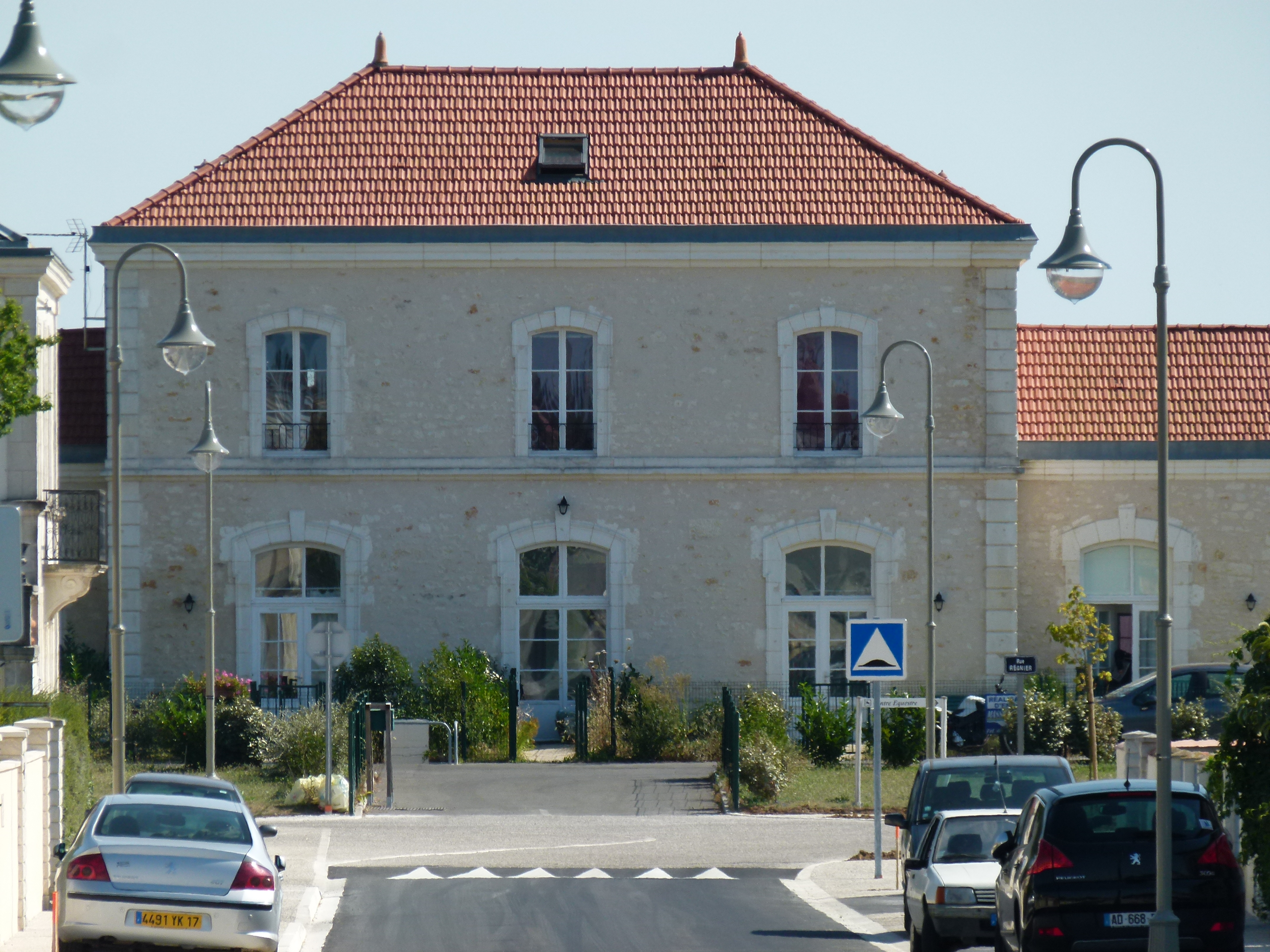 L'ancienne gare ferroviaire de Marennes (Charente-Maritime) a été réhabilitée en immeuble de logements.